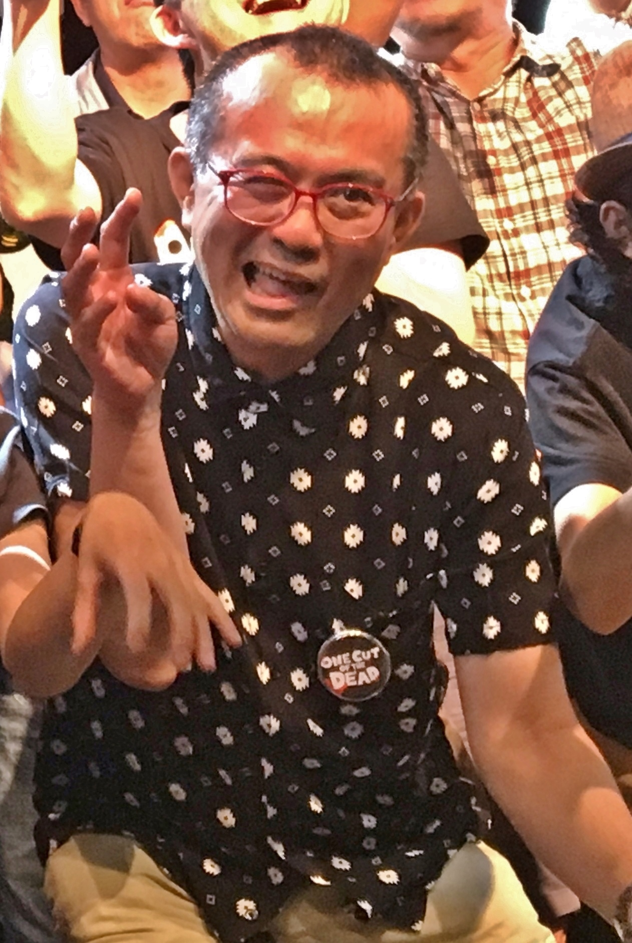 松崎まこと（2018年8月8日、LOFT9 Shibuya）